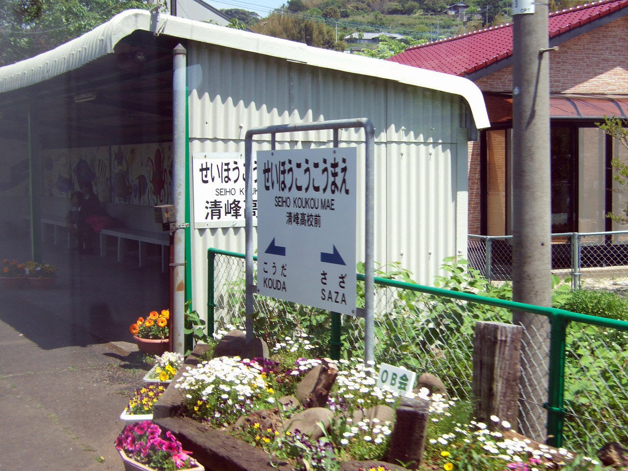 松浦鉄道清峰高校前駅ホーム（車内より）MR Seihoukoukou-Mae Station